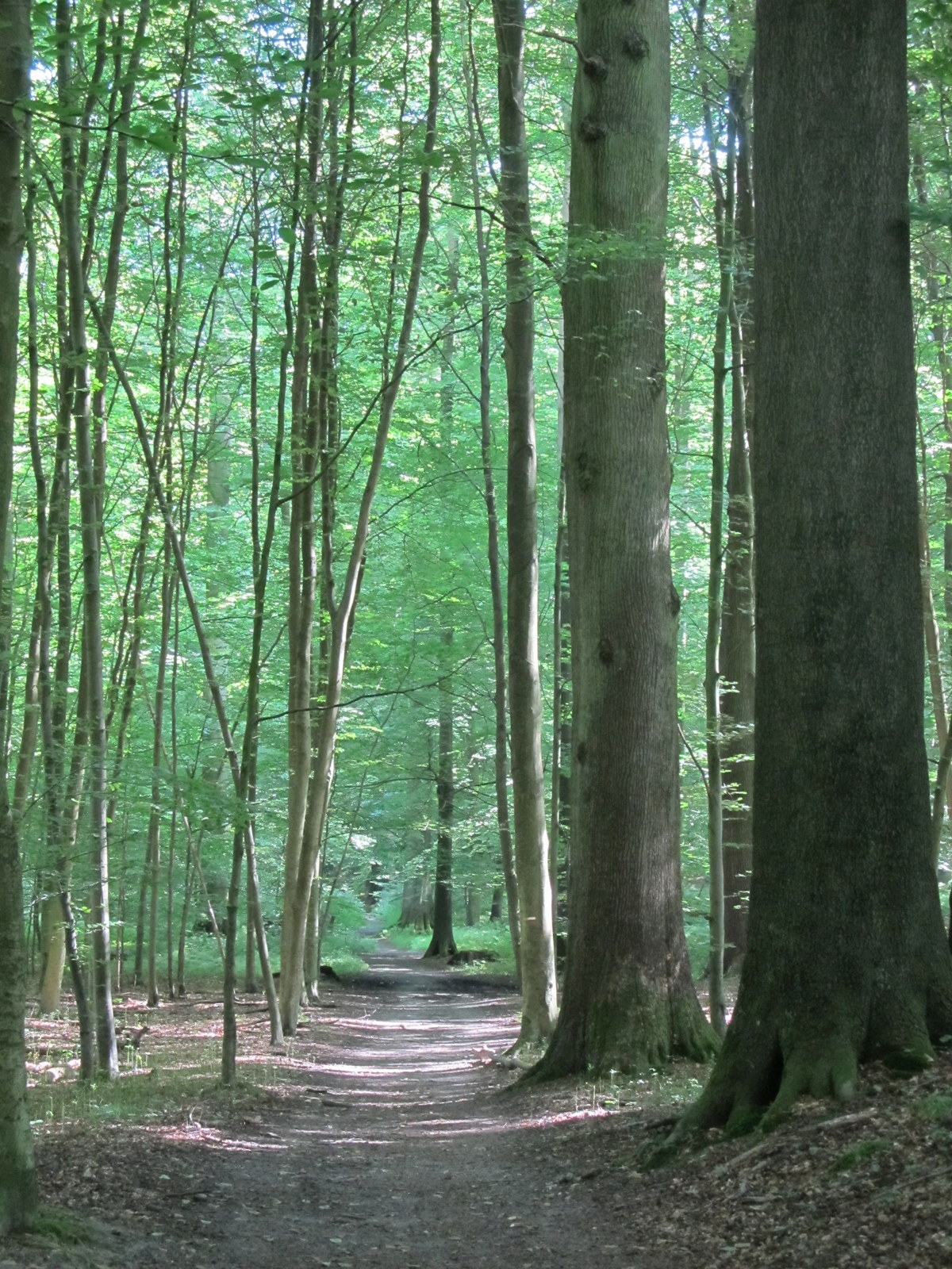 2012-08-15 in Zonienwoud